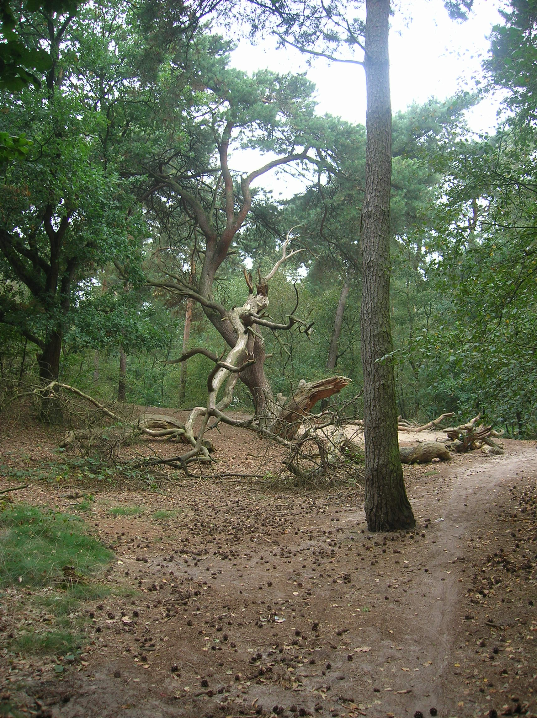 Zelfgemaakte foto, 17 september 2006, Erik1980: De Heksenboom in het Sint Anthonisbos